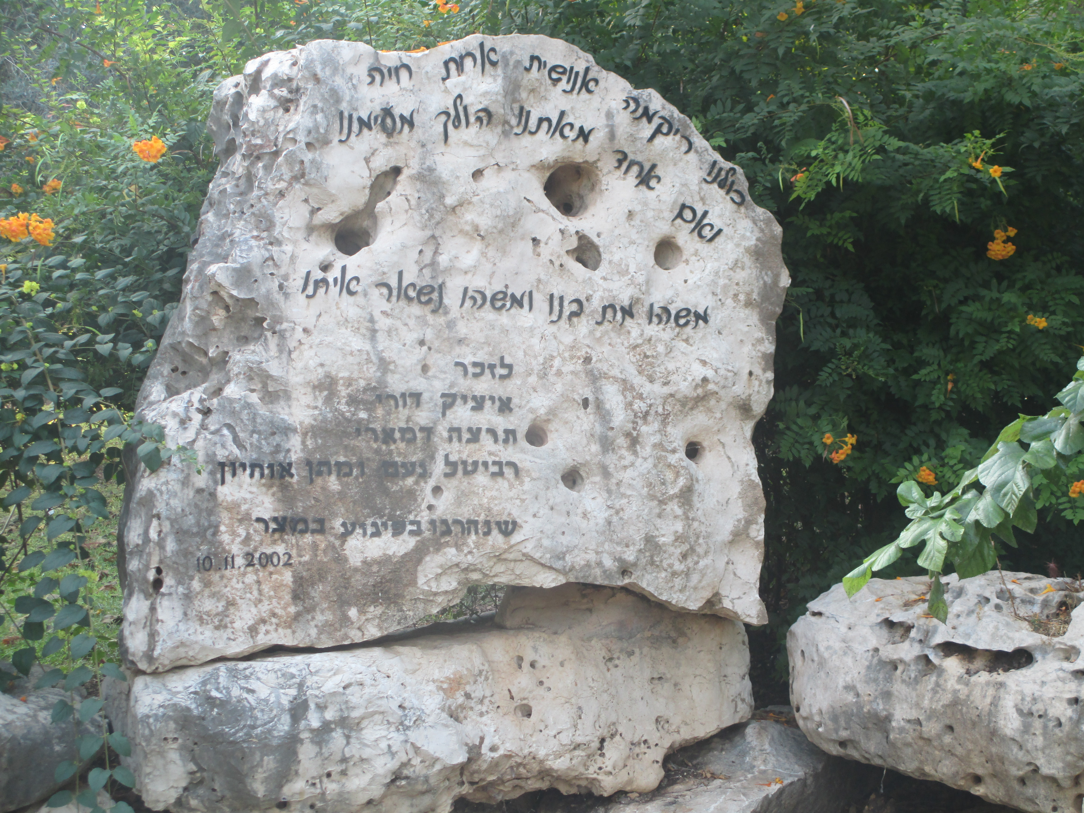 אנדרטה בקיבוץ מצר לנרצחים בפיגוע ב-2002